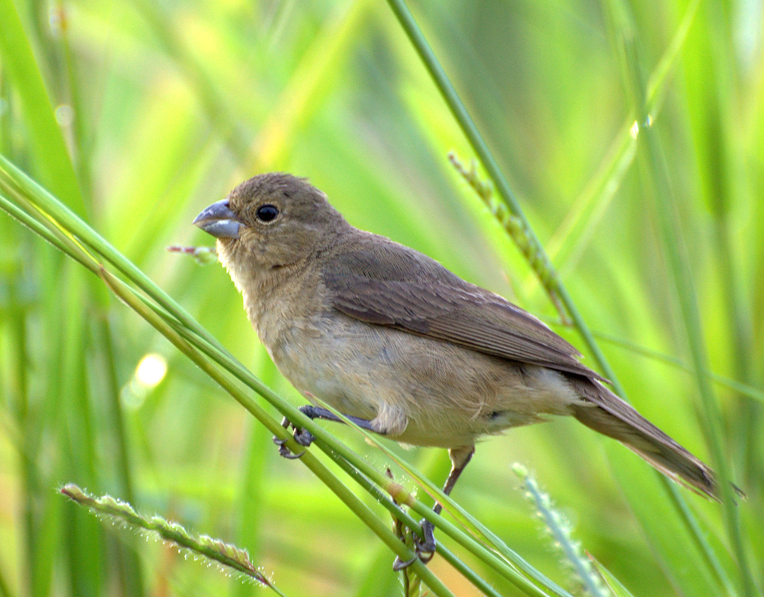 Cidade de Registro-SP